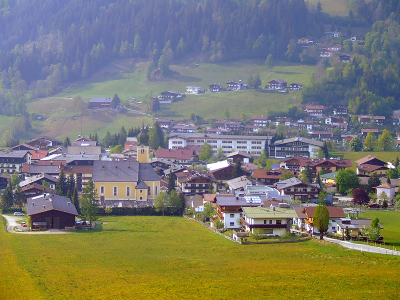 Dorfzentrum Westendorf/Tirol (Blick Richtung Norden)